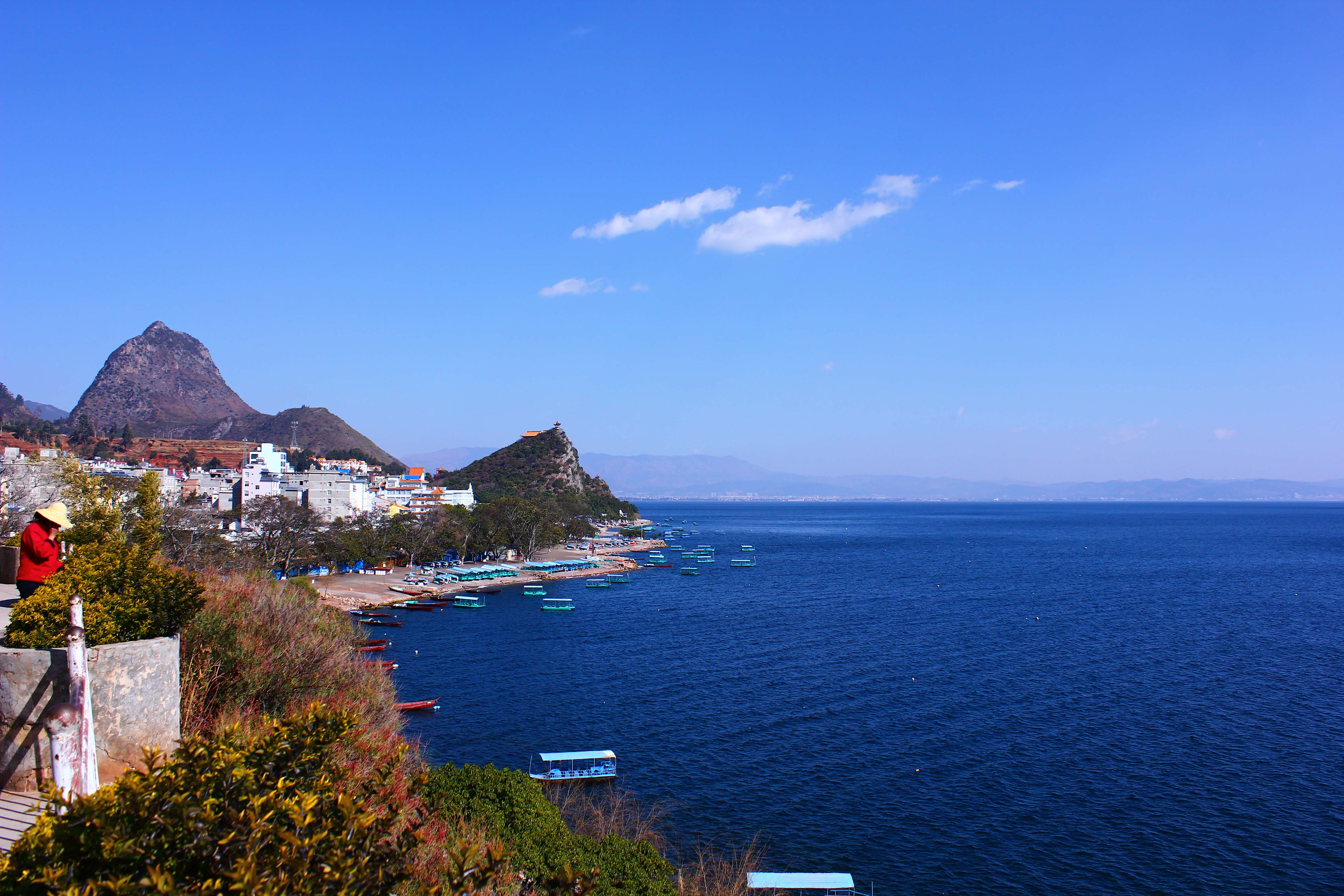 中国云南省澄江县境内的抚仙湖和禄充风景区。